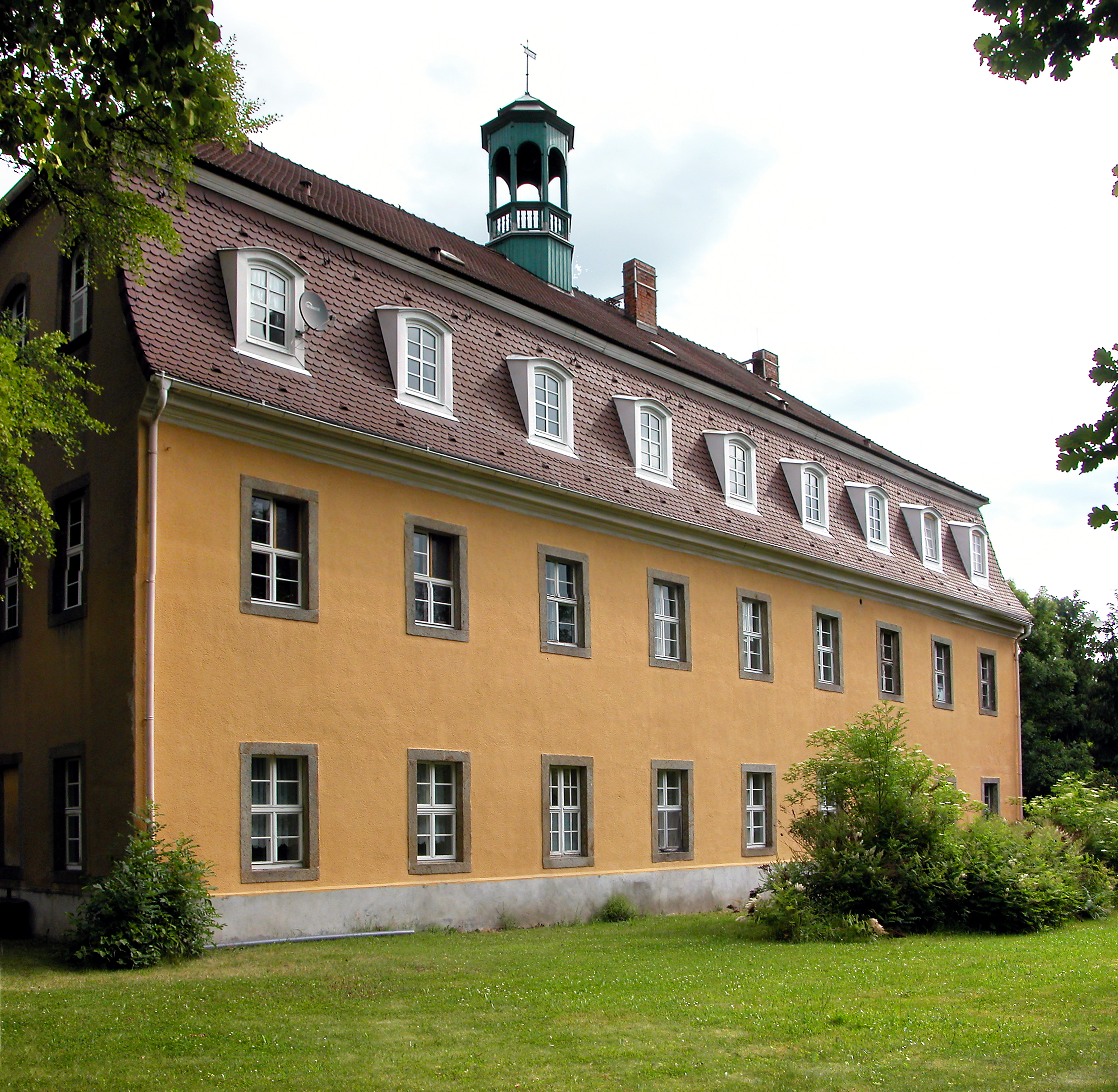 10.06.2012 02694 Preititz (Malschwitz) Alte Dorfstraße 12 (GMP: 51.220755,14.546021): Herrenhaus Preititz, Spätbarock, 1789 für Ferdinand Rudolph von Ziegler und Klipphausen erbaut. Heute Mehrfamilienhaus. [DSCNn4108-4109.TIF]20120610200MDR.JPG(c)Blobelt Hornjoserbsce: Knježi dom w Přiwćicach